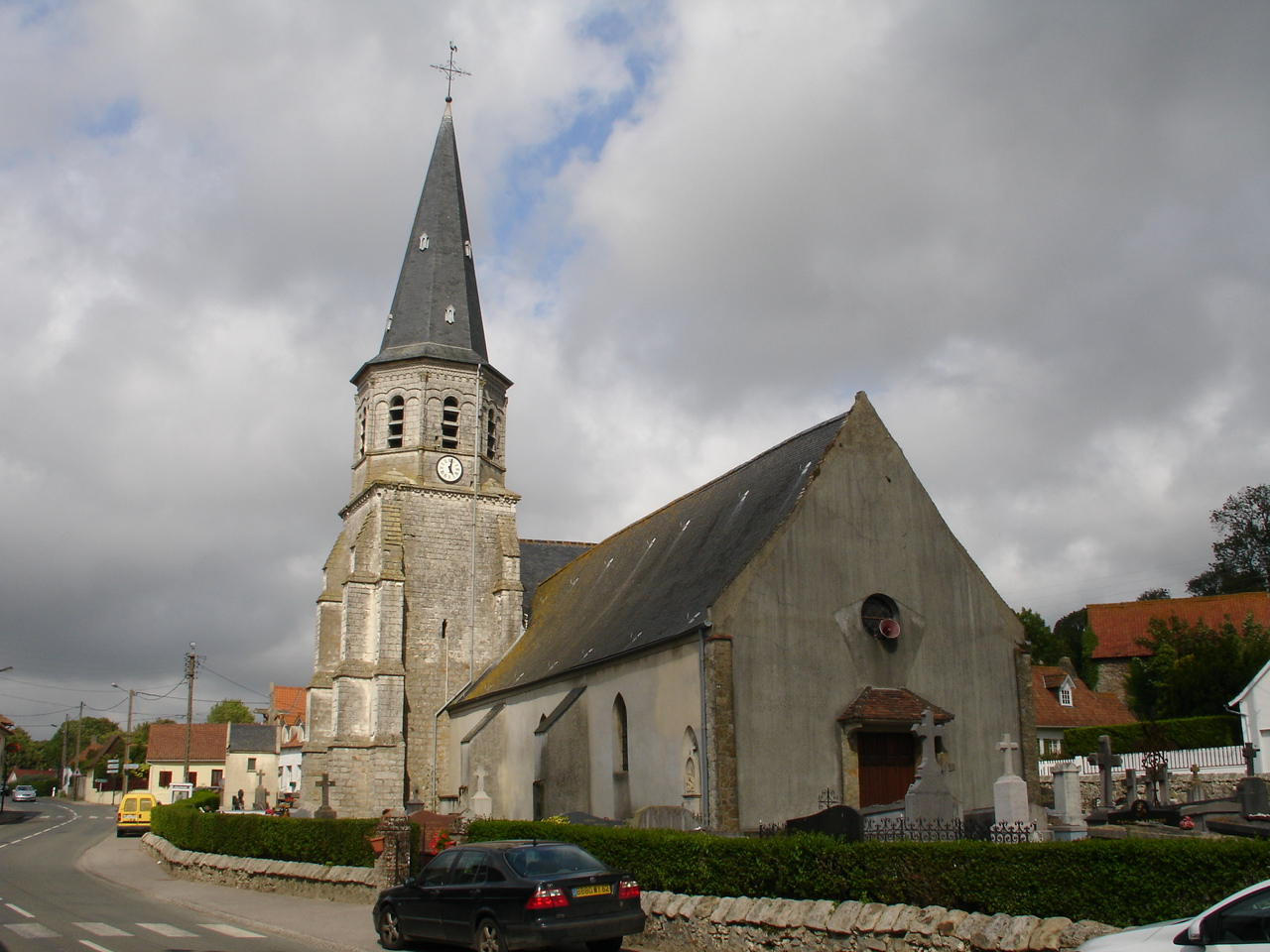 Église de Frencq